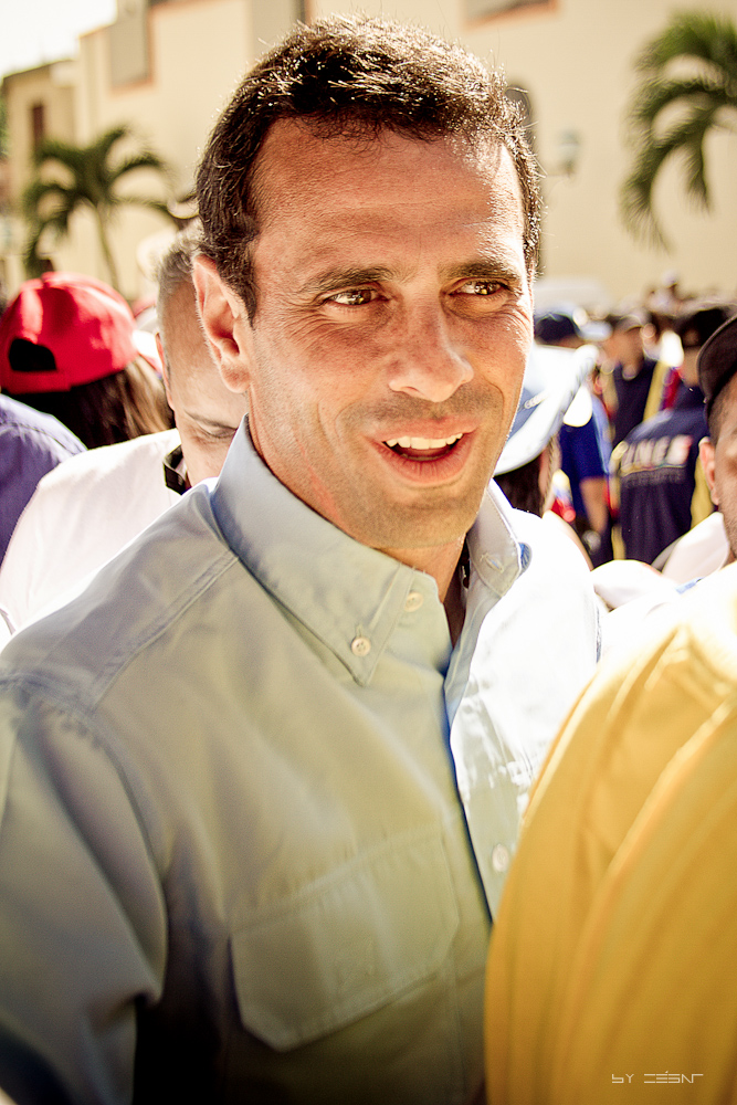 Capriles Radonski - Venezuela.